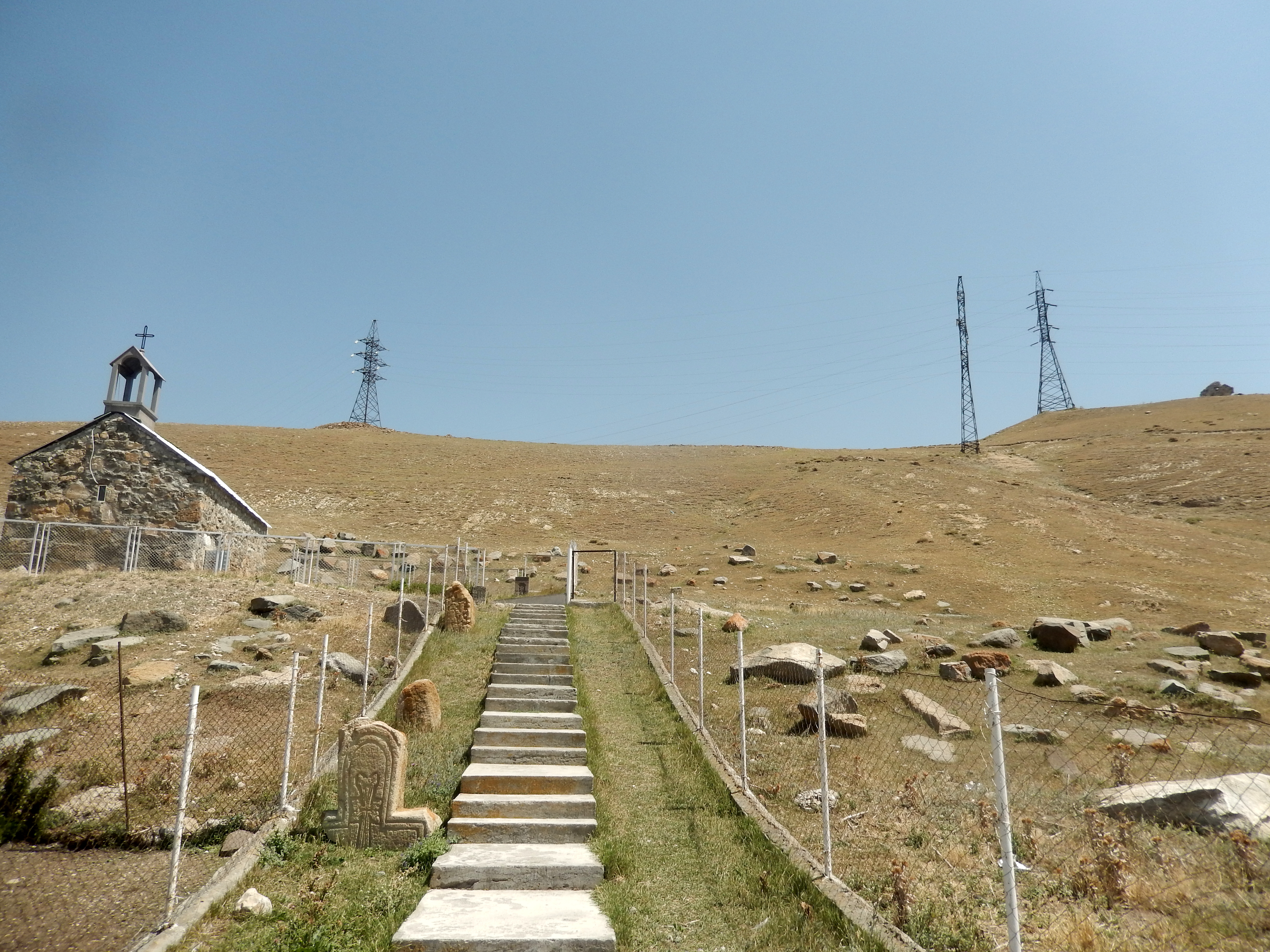 Շորժա, եկեղեցի 16-րդ դ.